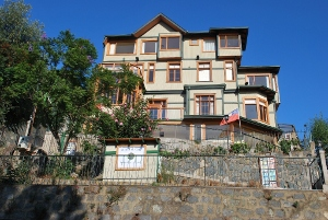 Fachada del Hotel Sutherland en el cerro Alegre de Valparaiso; foto tomada desde el nivel de la calle